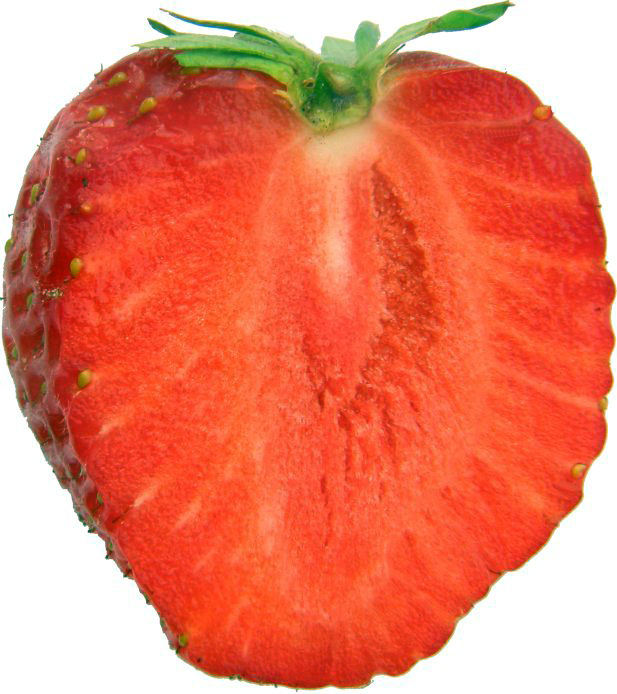 zelfgemaakte foto van aardbei dwarsdoorsnede. De gele zogenaamde zaadjes zijn dopvruchtjes.